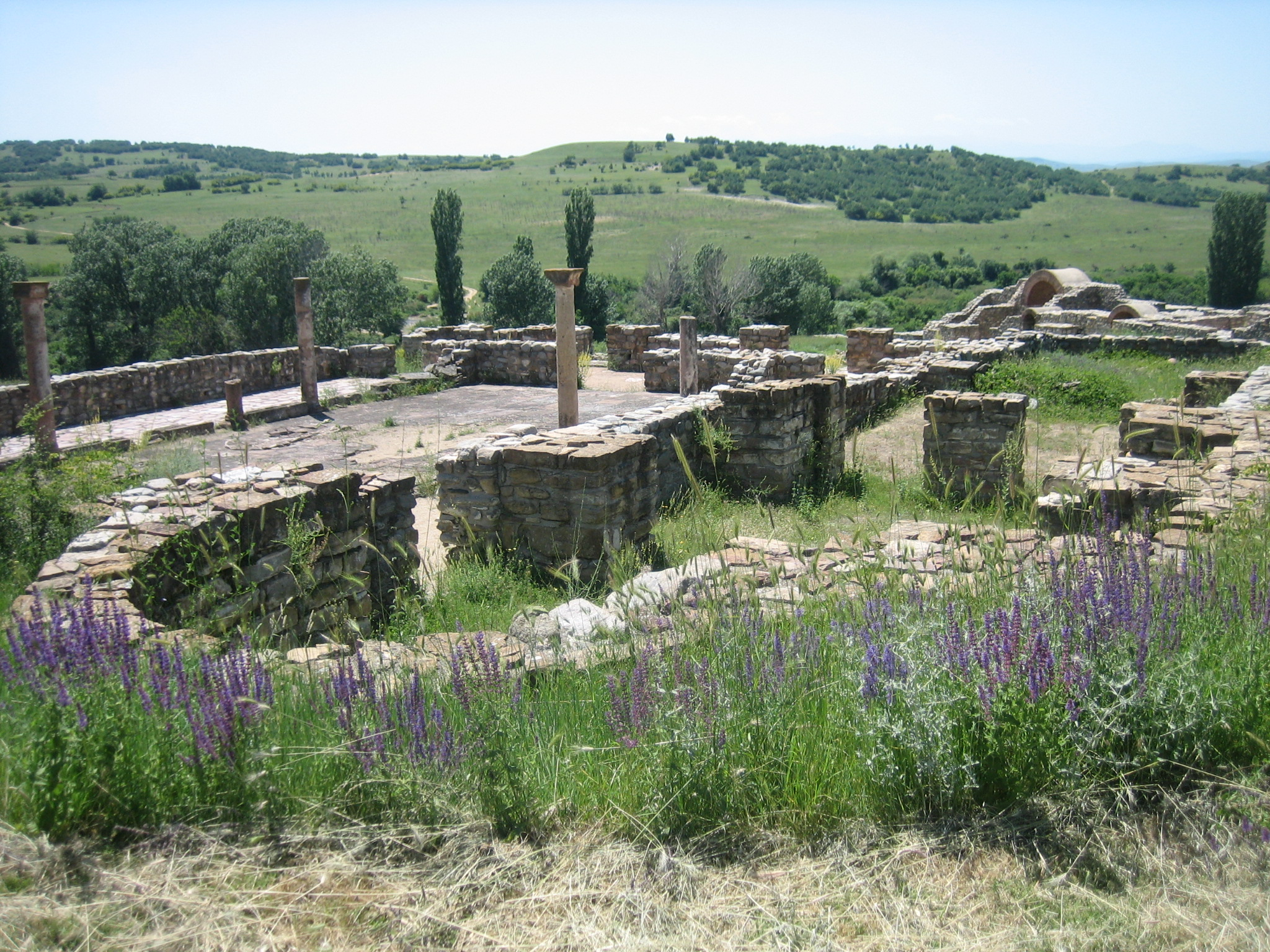 Bargala